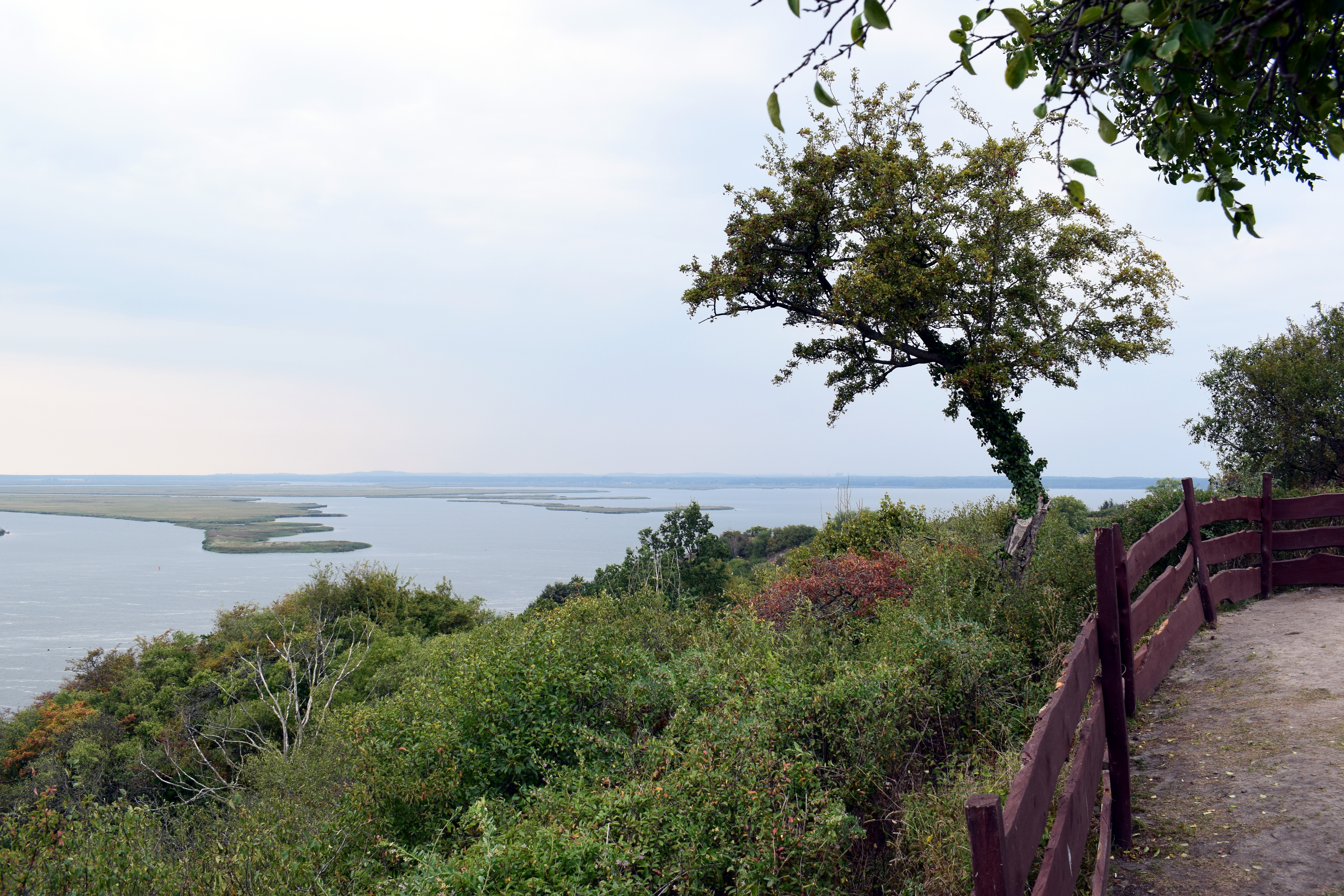 Grodzisko w Lubinie: Blick auf das Rückseitendelta der Swine.